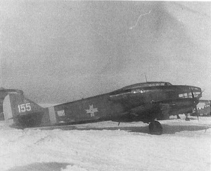 Savoia Marchetti SM.79 B-JR Rumeno